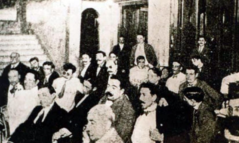 Primera Asamblea Extraordinaria de la Sociedad de Autores. (Hoy ARGENTORES) 11 de septiembre de 1911. Casa de Enrique García Velloso.